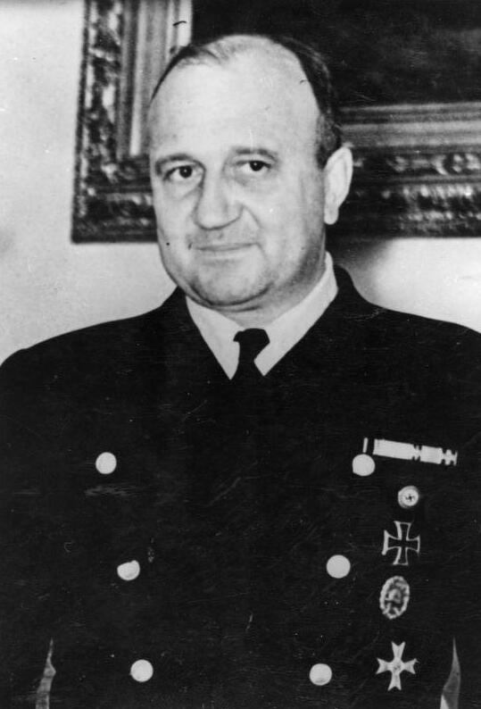 Karl Clodius Clodius Aufn.: Illus [Porträt Wirtschaftsberater im Auswärtigen Amt Dr. Karl Clodius] Abgebildete Personen: Clodius, Karl Dr.: Ministerialdir., Vizepräsident Deutsch-Italienische-Gesellschaft, Deutschland